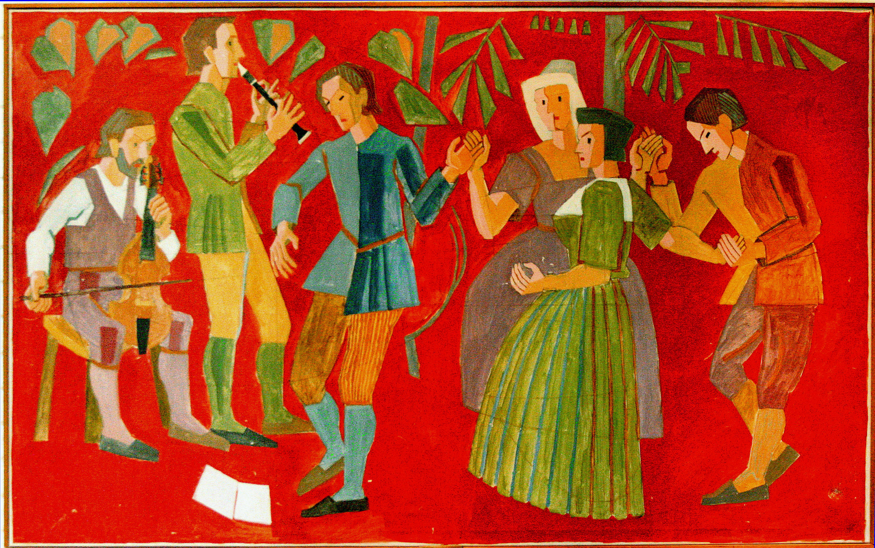 Pattern for tapestry